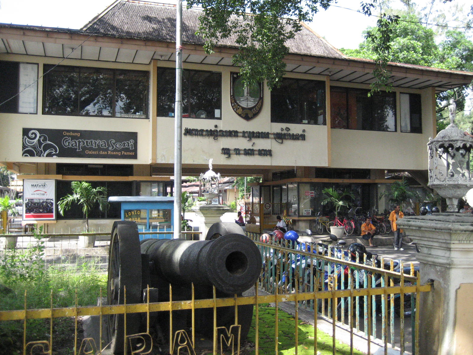 Taman Sriwedari, pusat Budaya dan kesenian di Surakarta